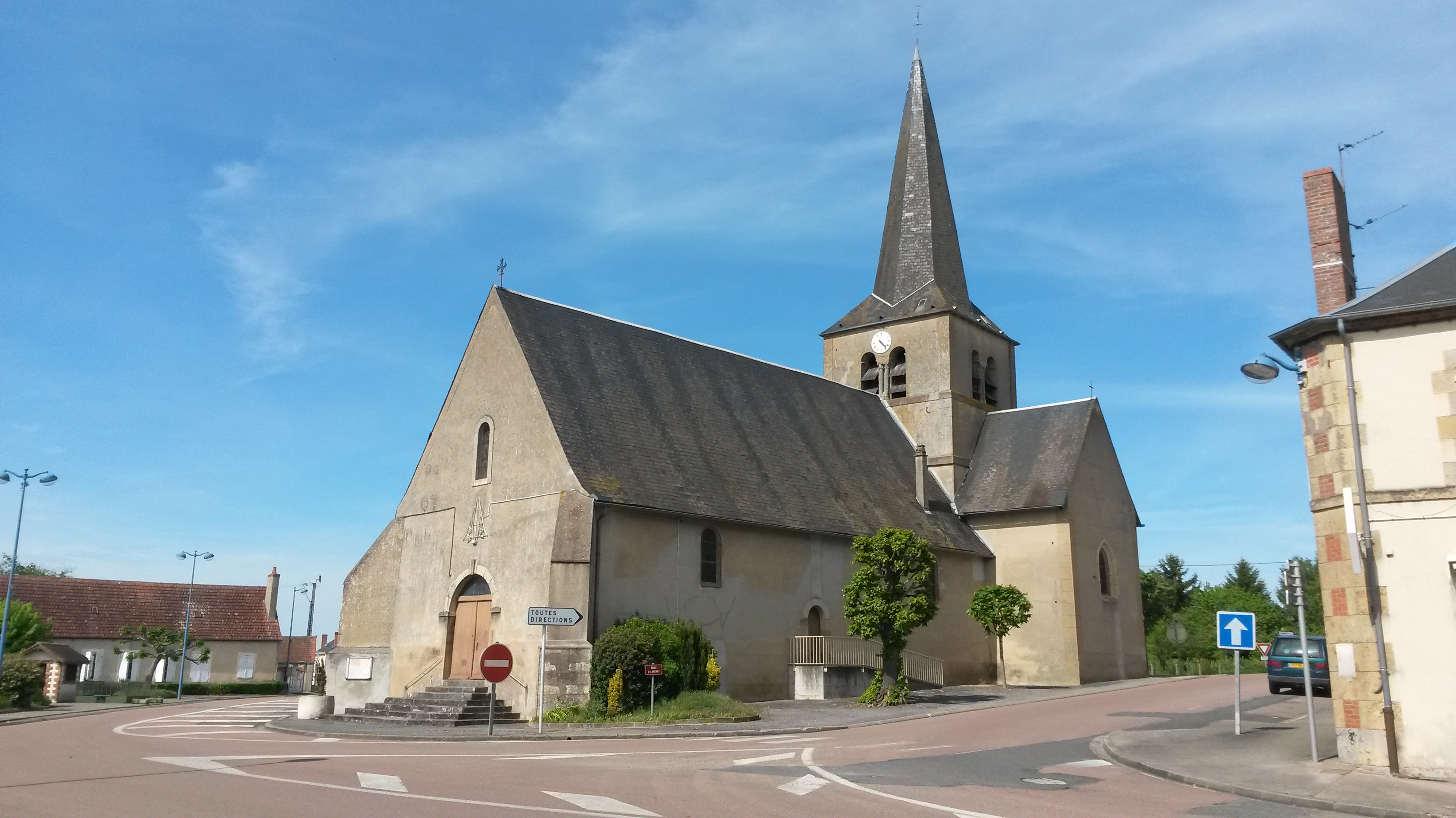 Cossaye - L'église